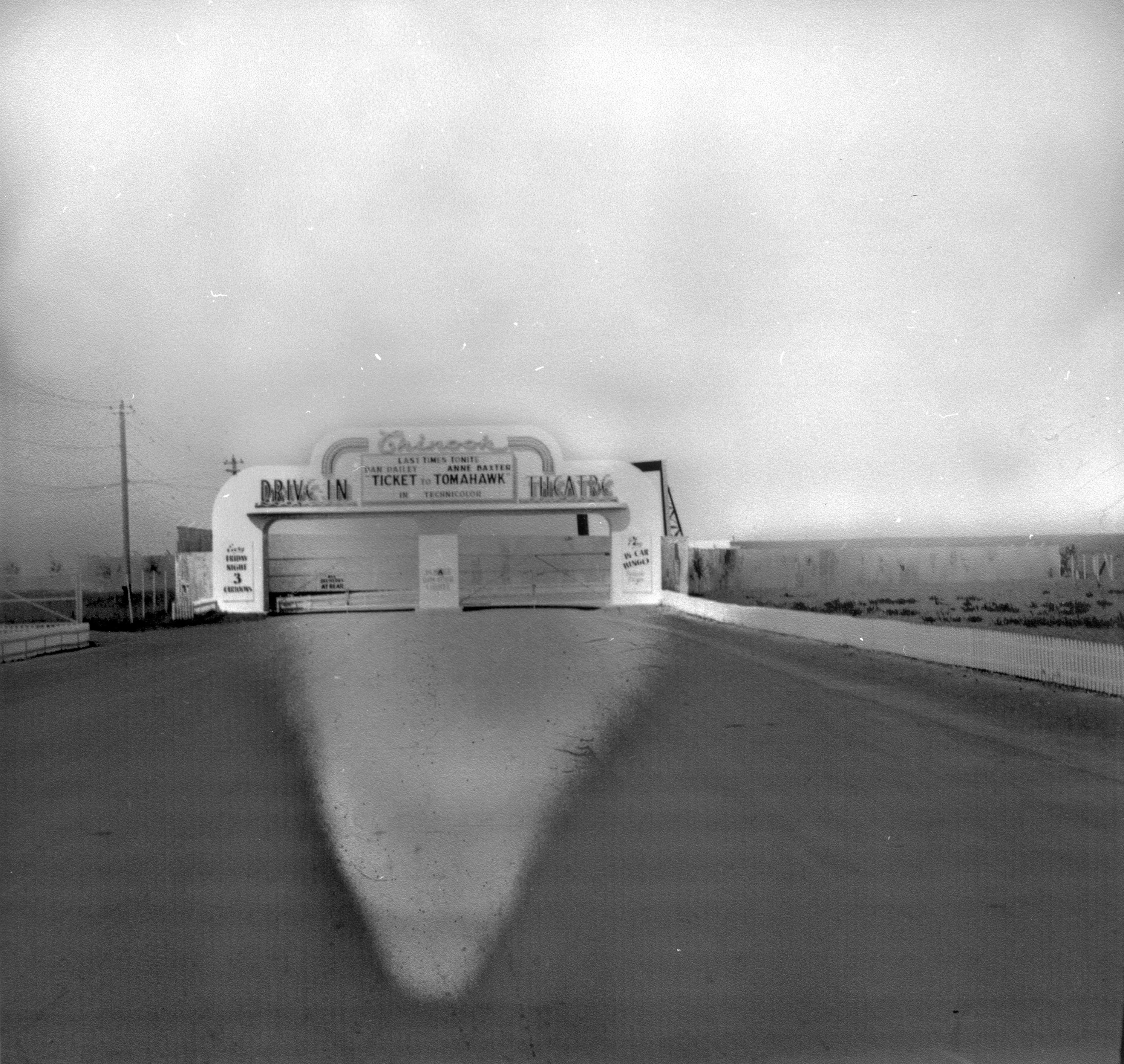 A12218